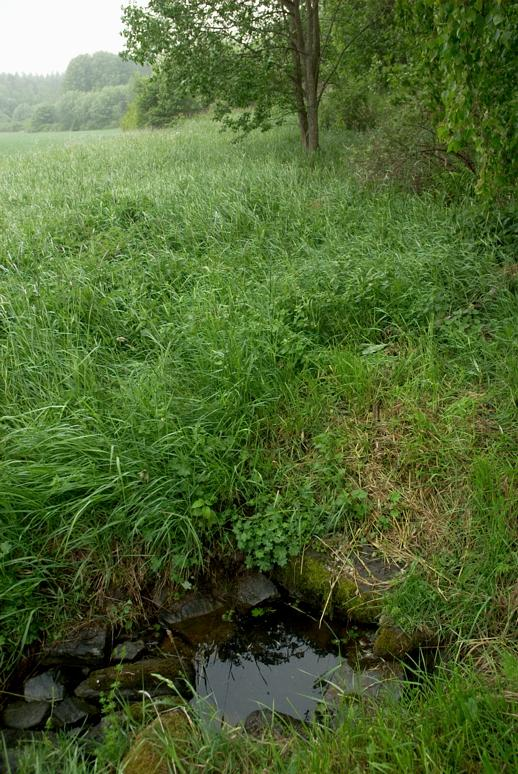 Trefaldighetskällan vid Svinnegarn omtalas redan under 1300-talet. Än idag förekommer här trefaldighetsfirande då man avsmakar det hälsobringande vattnet.